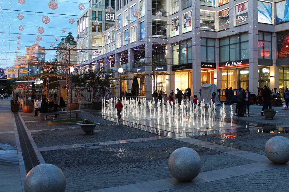 Катеринославський бульвар у Дніпрі.